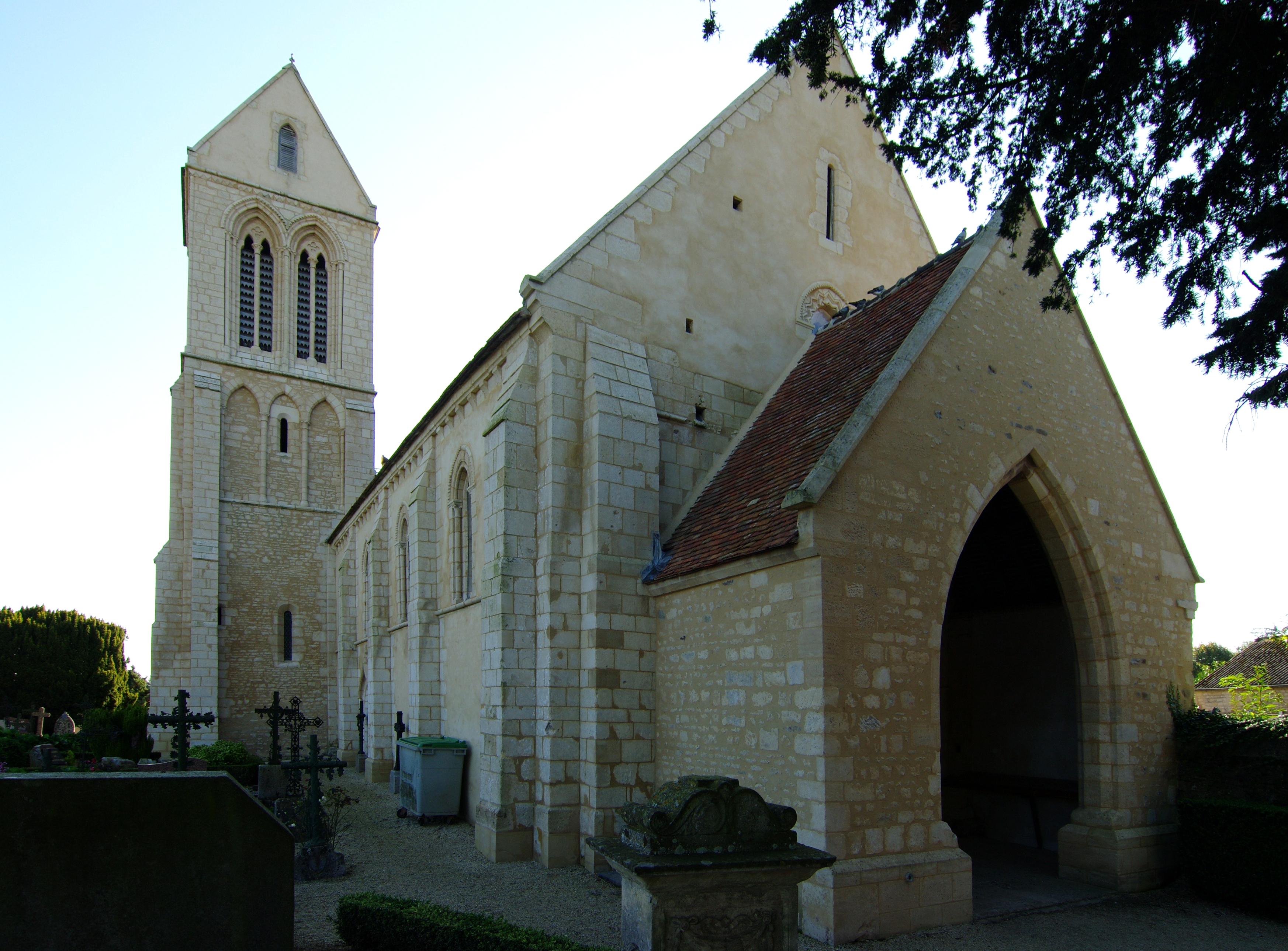 L'église Notre-Dame à Potigny 14